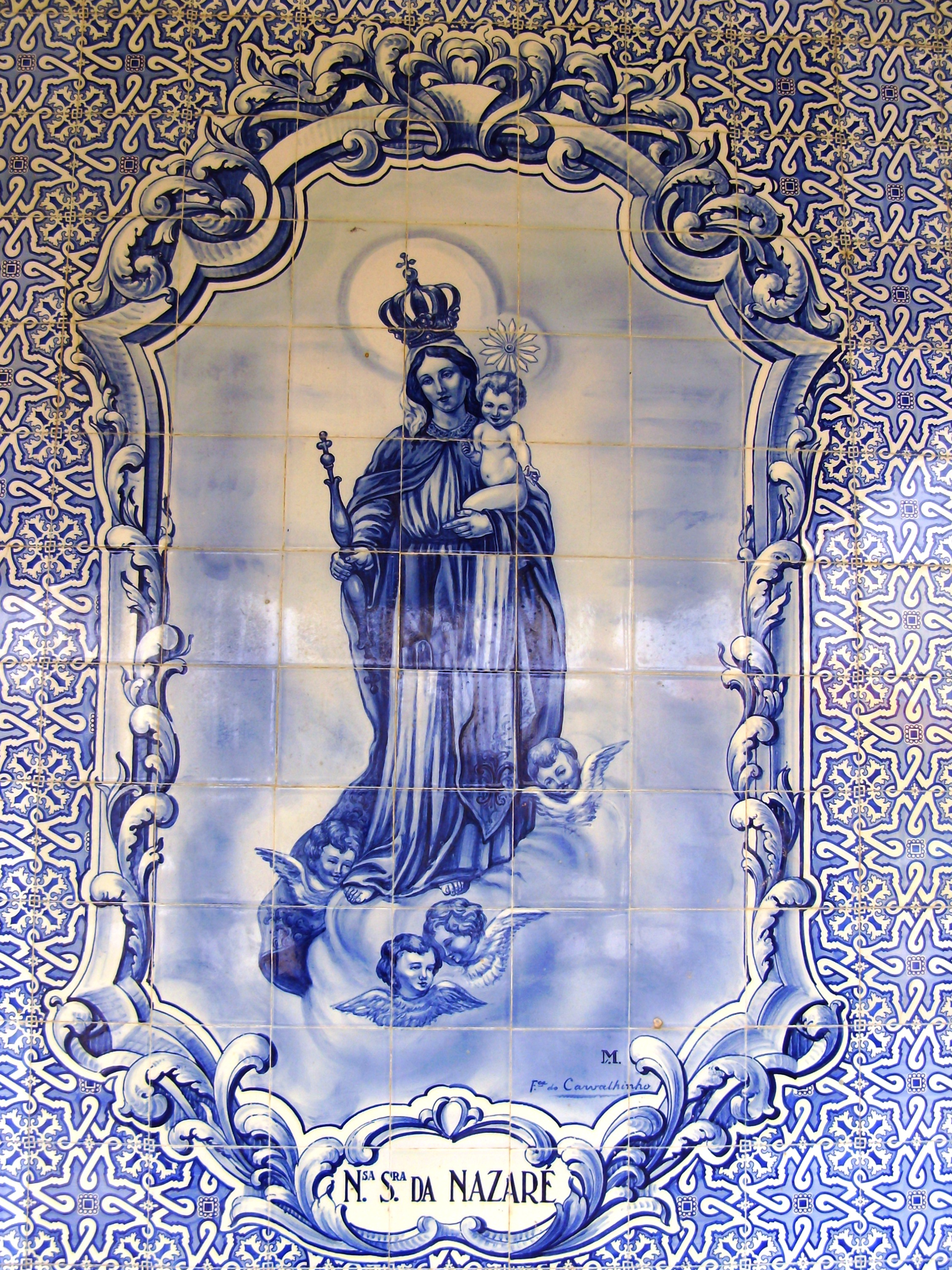 Capela de Nossa Senhora de Nazaré, praia de Cortegaça, concelho de Ovar, distrito de Aveiro, Portugal: painel de azulejos na fachada representando N. Sra. de Nazaré.